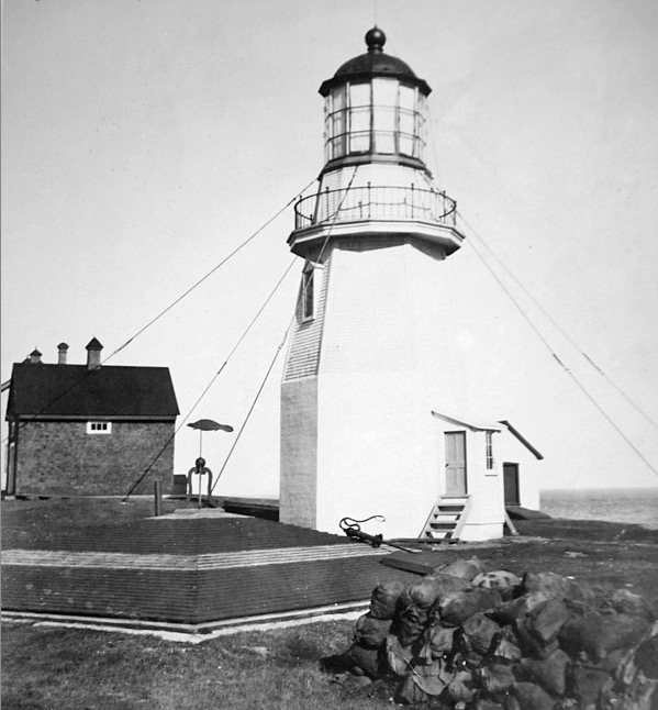 Le phare du rocher aux oiseaux, au Québec.